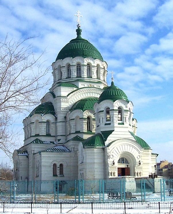 Владимирский собор города Астрахани